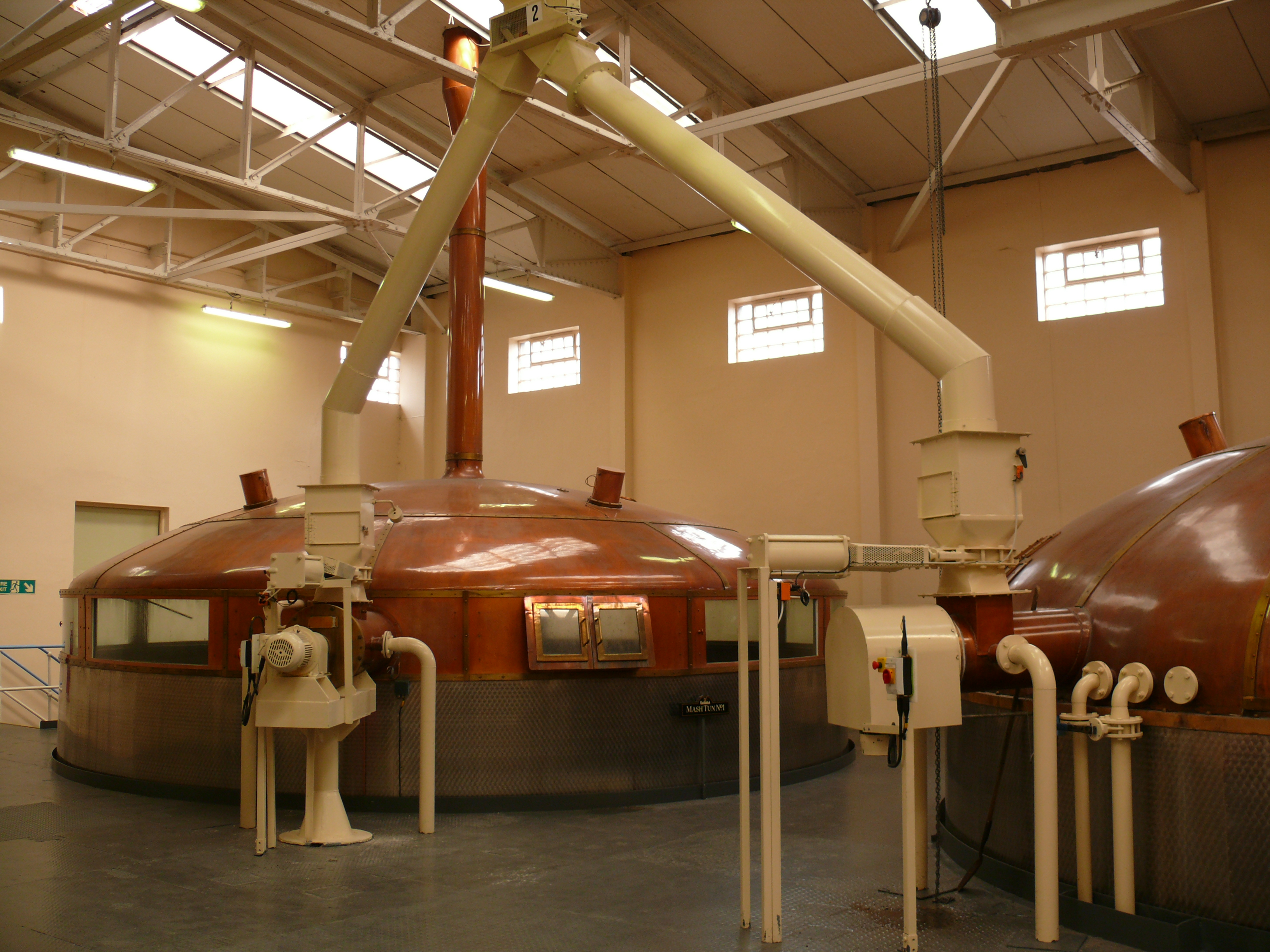 Glenfiddich distillery